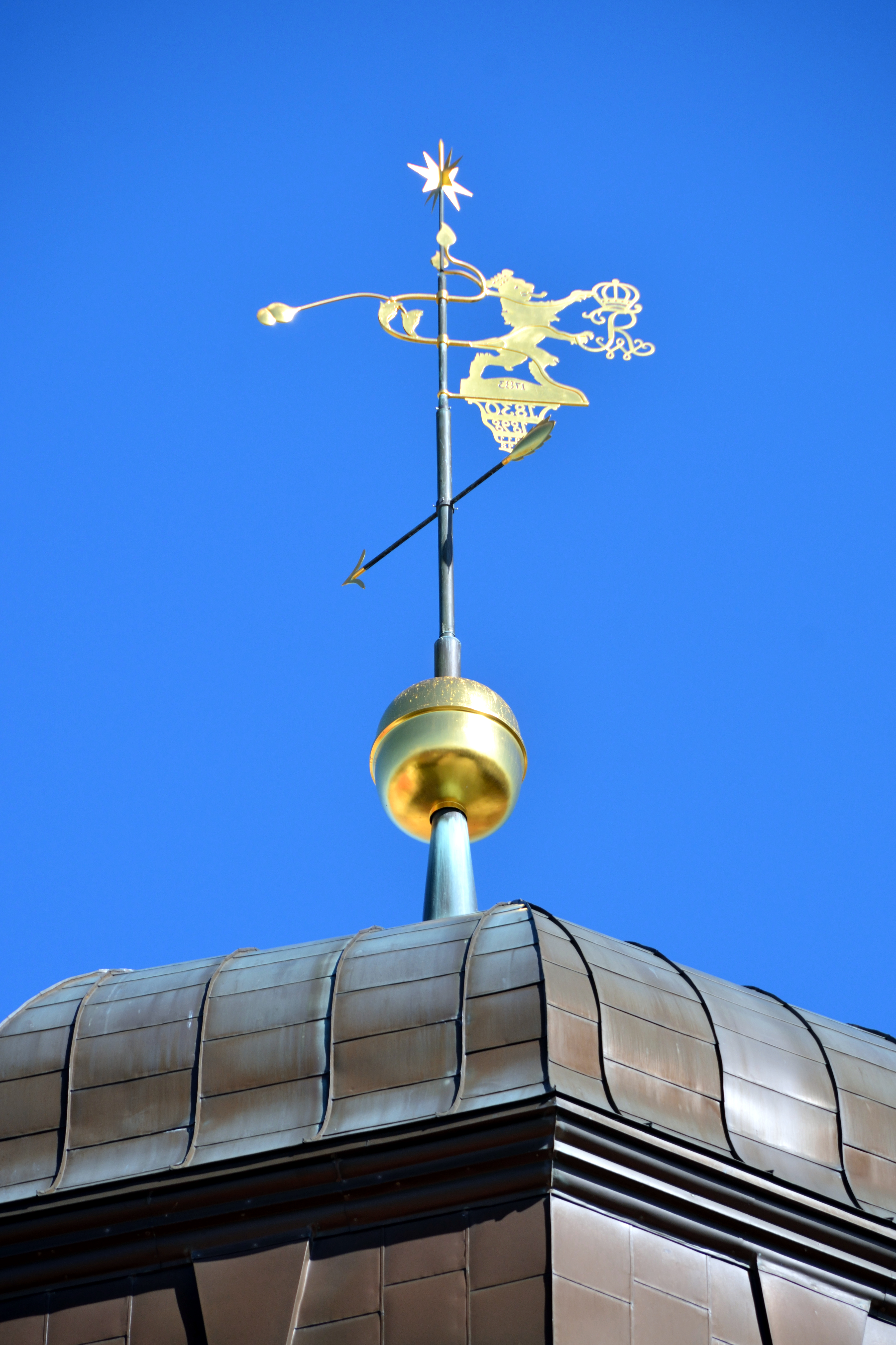 Impressionen einer GLAM on Tour (2018) im Senckenberg Museum für NaturkundeHier: Bild vom "Dicken Turm", in Sichtweite vom Museum.